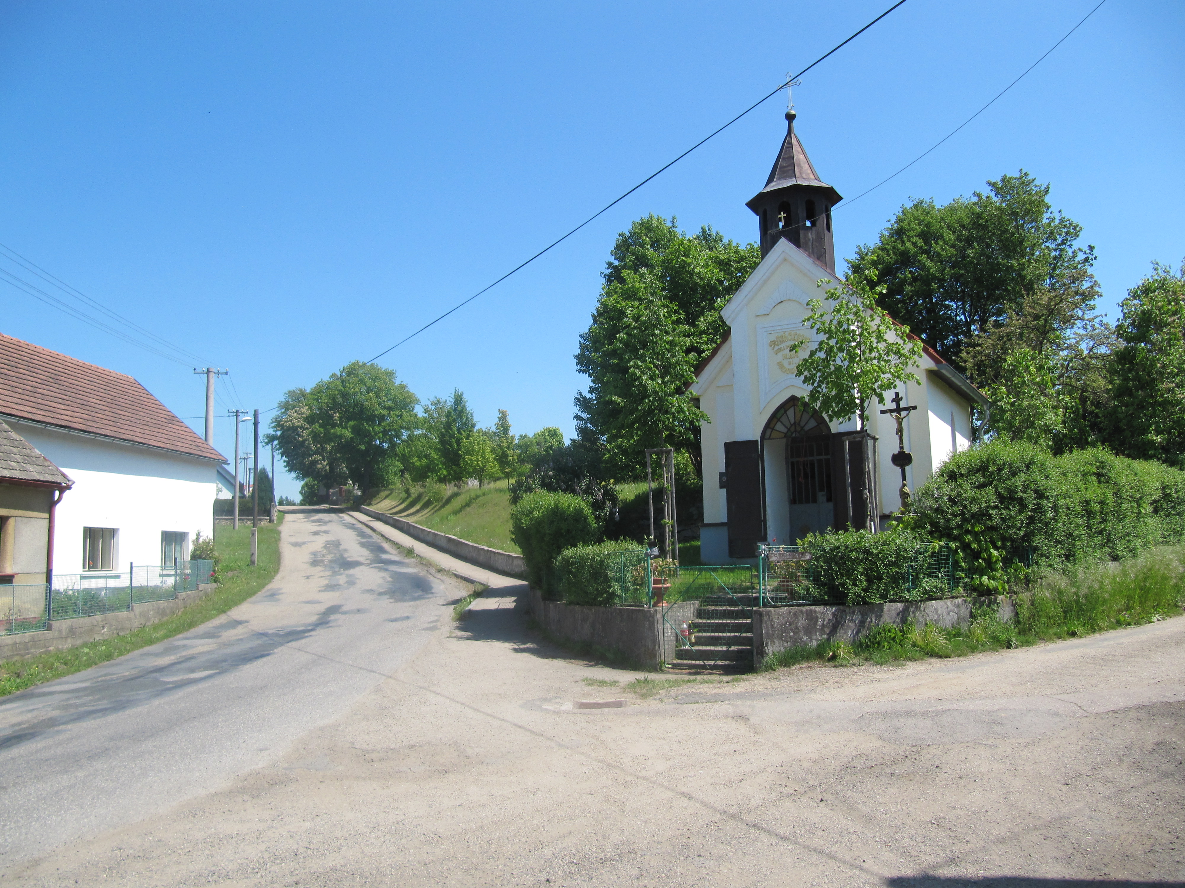 Slověnice